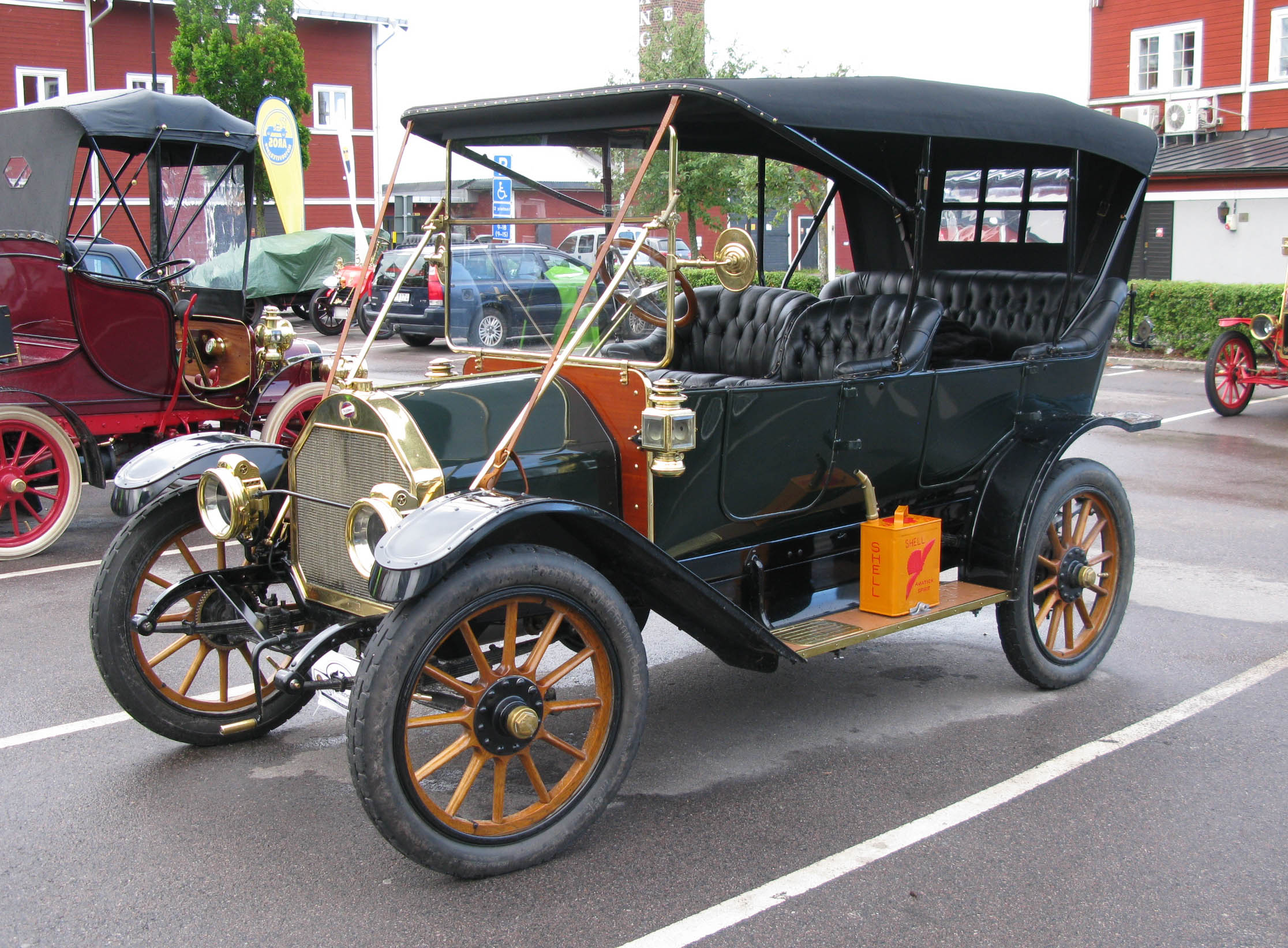 Overland 59 Touring 1912